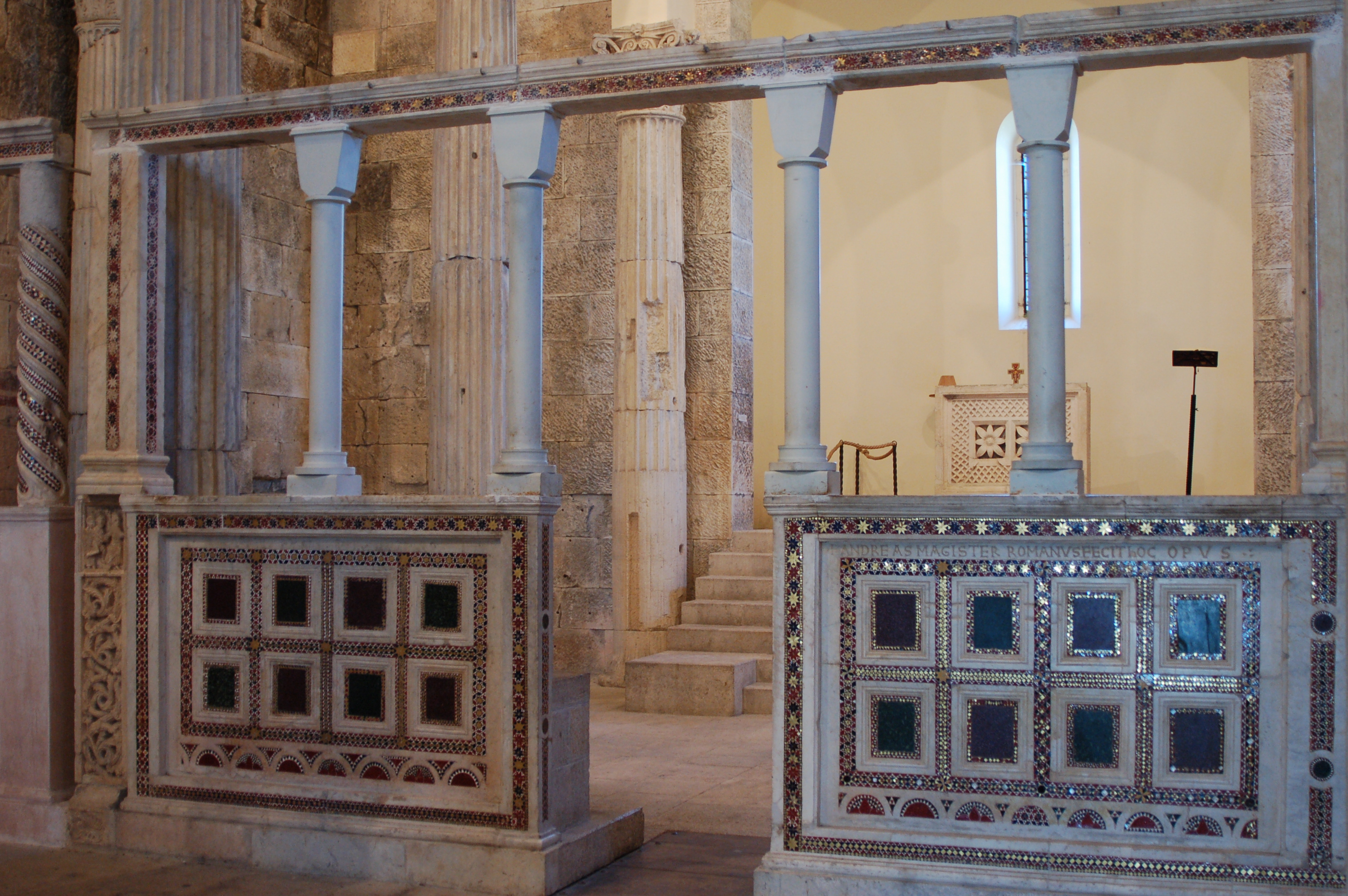 Iconostasis de la Iglesia de San Pietro en Alba Fucens